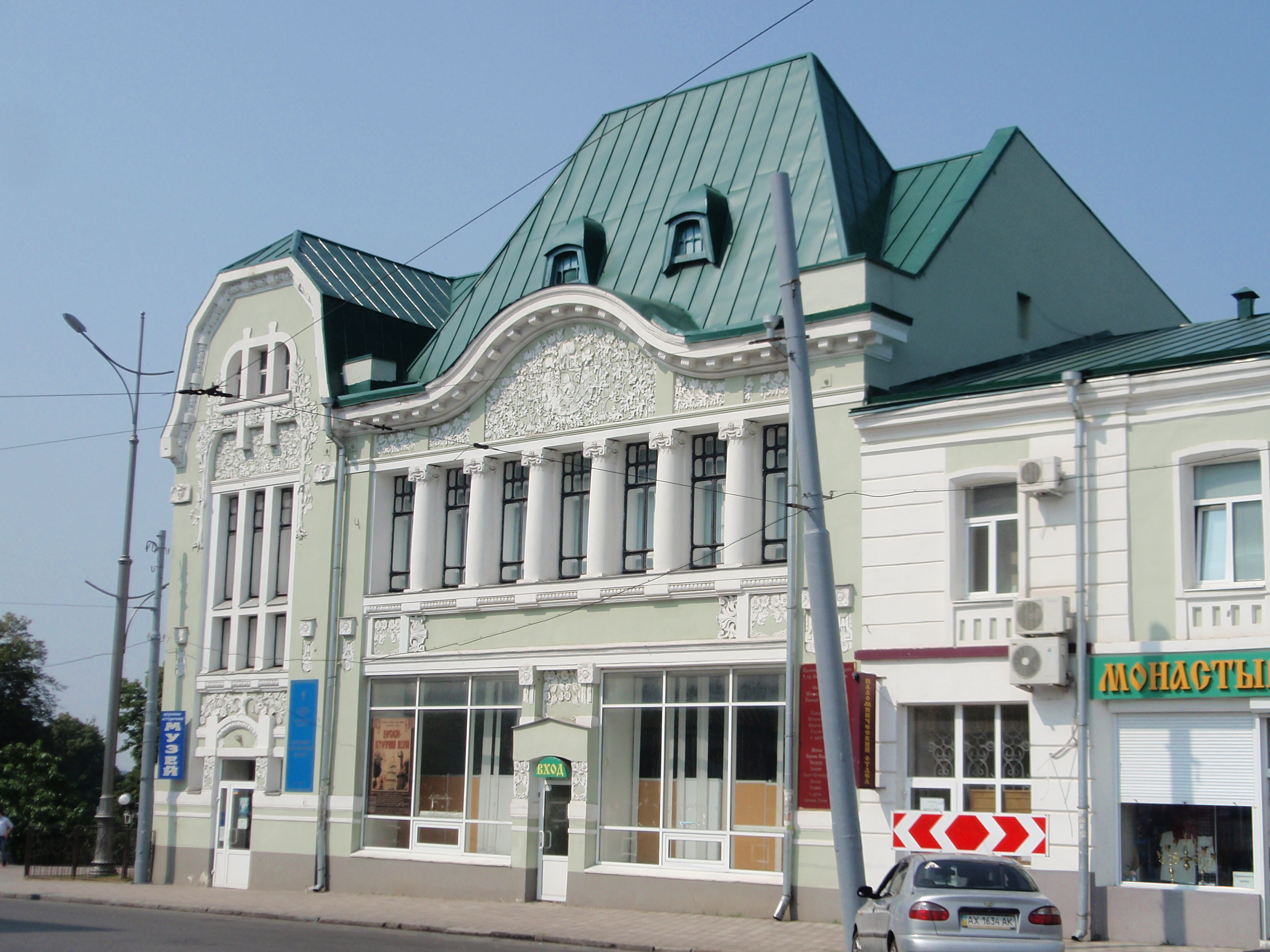 Магазин Жирардівської мануфактури, Харків, вул. Університетська, 10